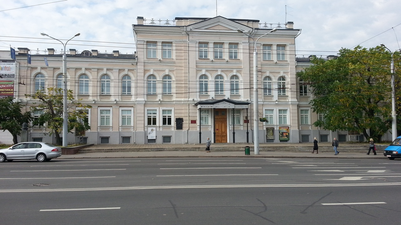 Беларуская (тарашкевіца): Будынак былога акруговага суда. г. Віцебск This is a photo of Belarusian heritage monument. Reference number: 212Г000050 ( WLM)